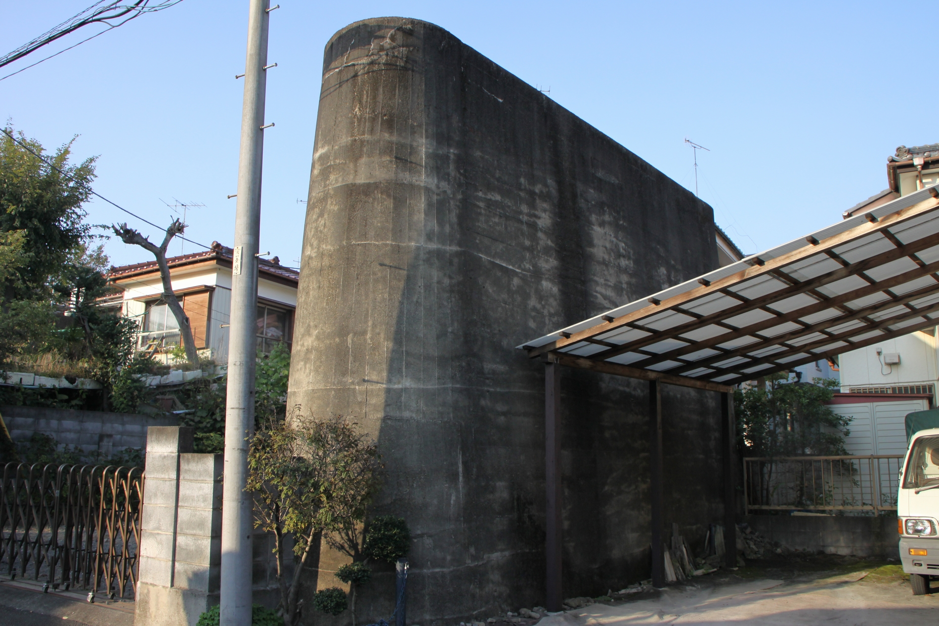 京王御陵線の橋脚